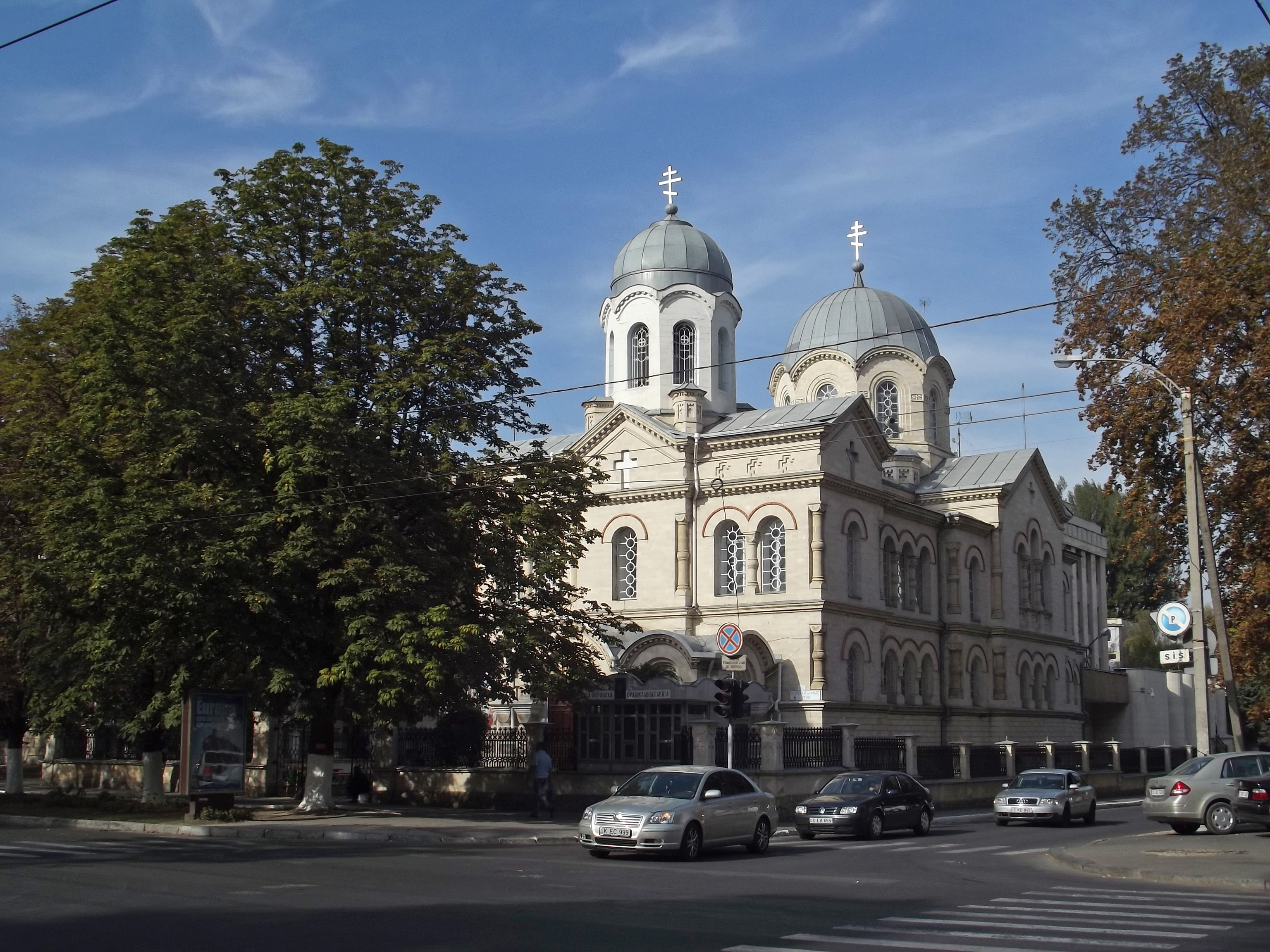 Спасо-Преображенский собор